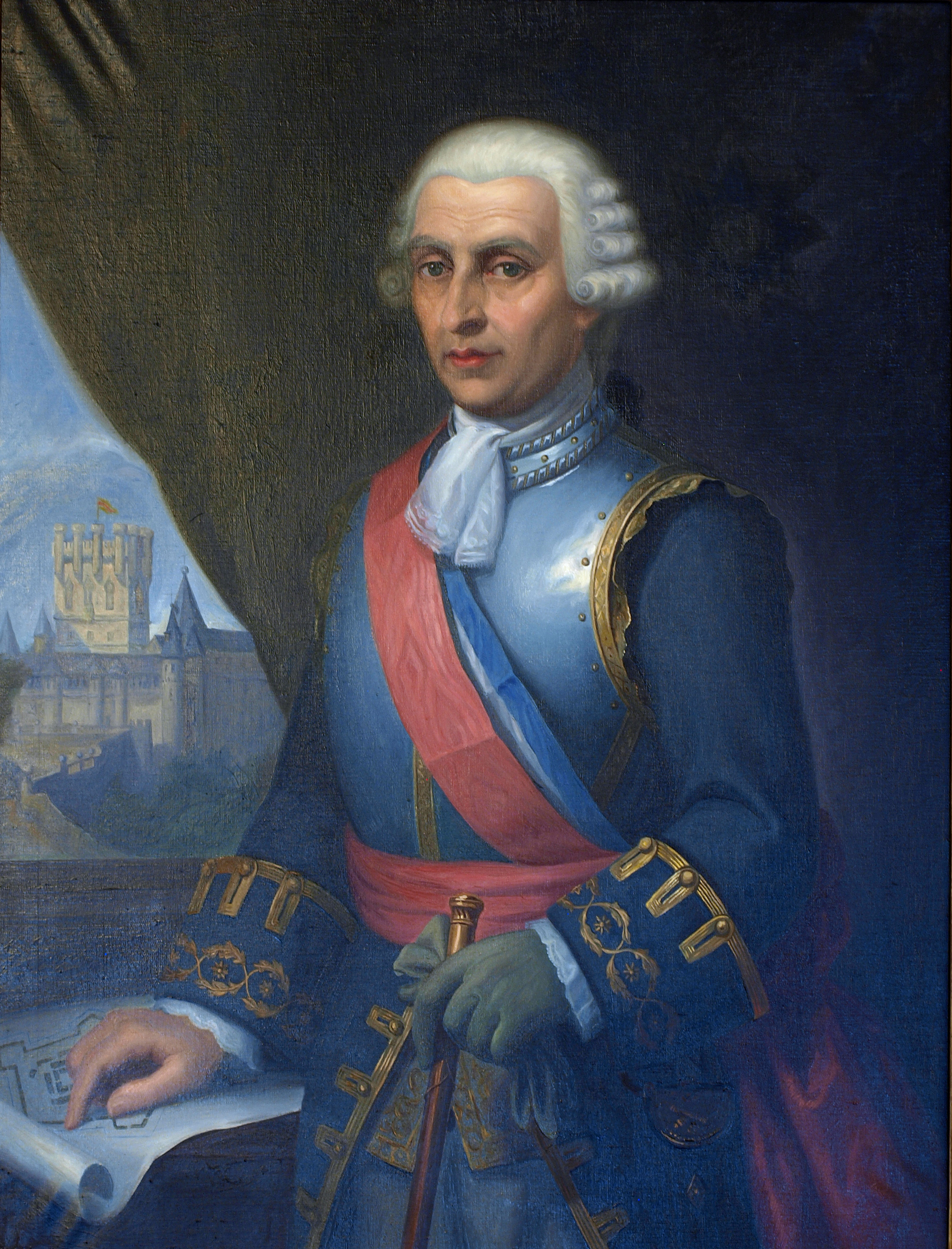 Felice Gazzola con el Real Colegio de Artillería, ubicado en el Alcázar de Segovia, al fondo.